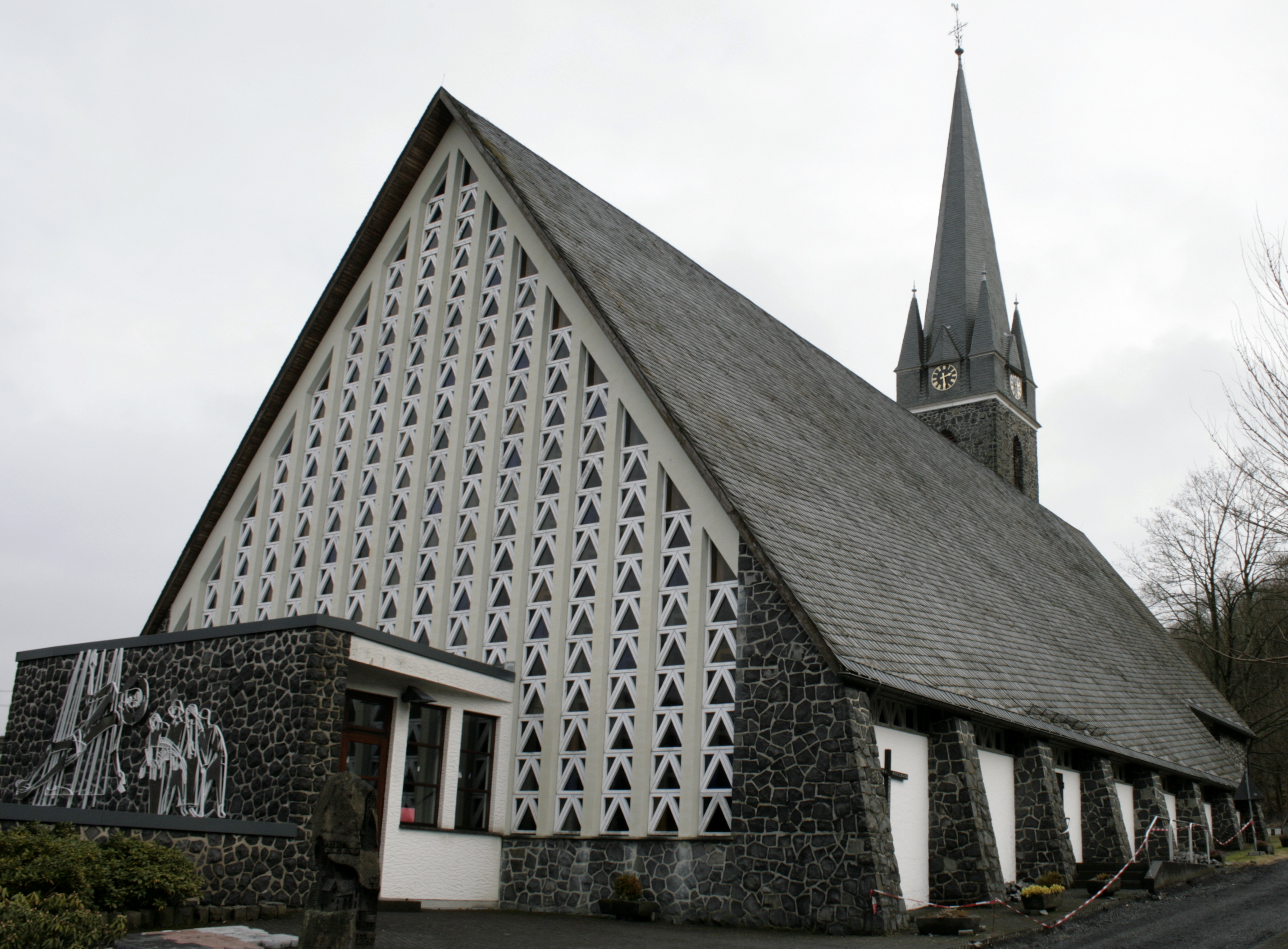 Pfarrkirche in Wilsenroth, Deutschland